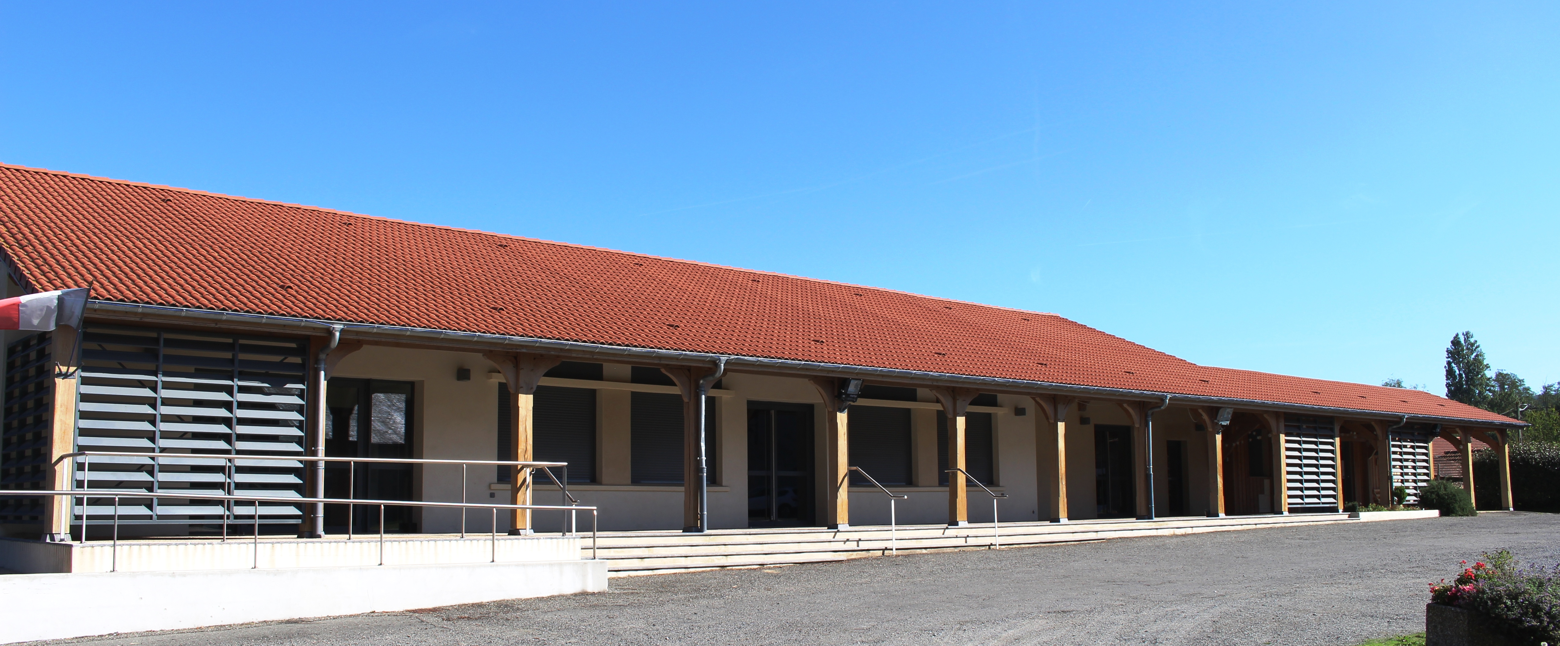 Salle des fêtes de Cabanac (Hautes-Pyrénées)